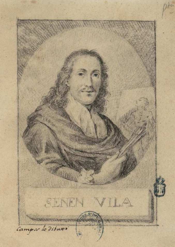 Retrato de Senén Vila, dibujo a lápiz grafito. Inscripción "Campos lo dibuxó".